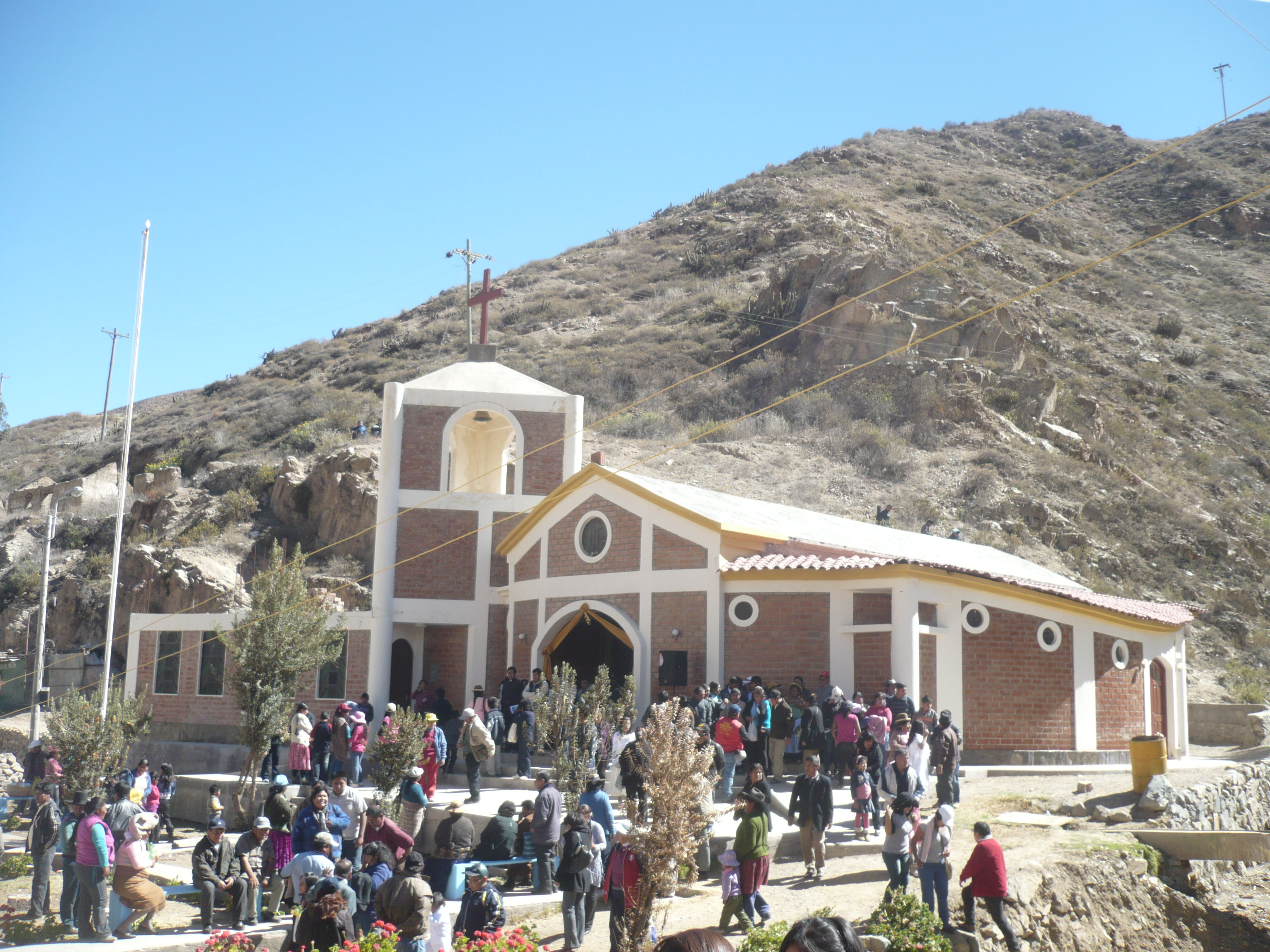 Vista hermosa de la parroquia de San Pedro en causuri, palca.